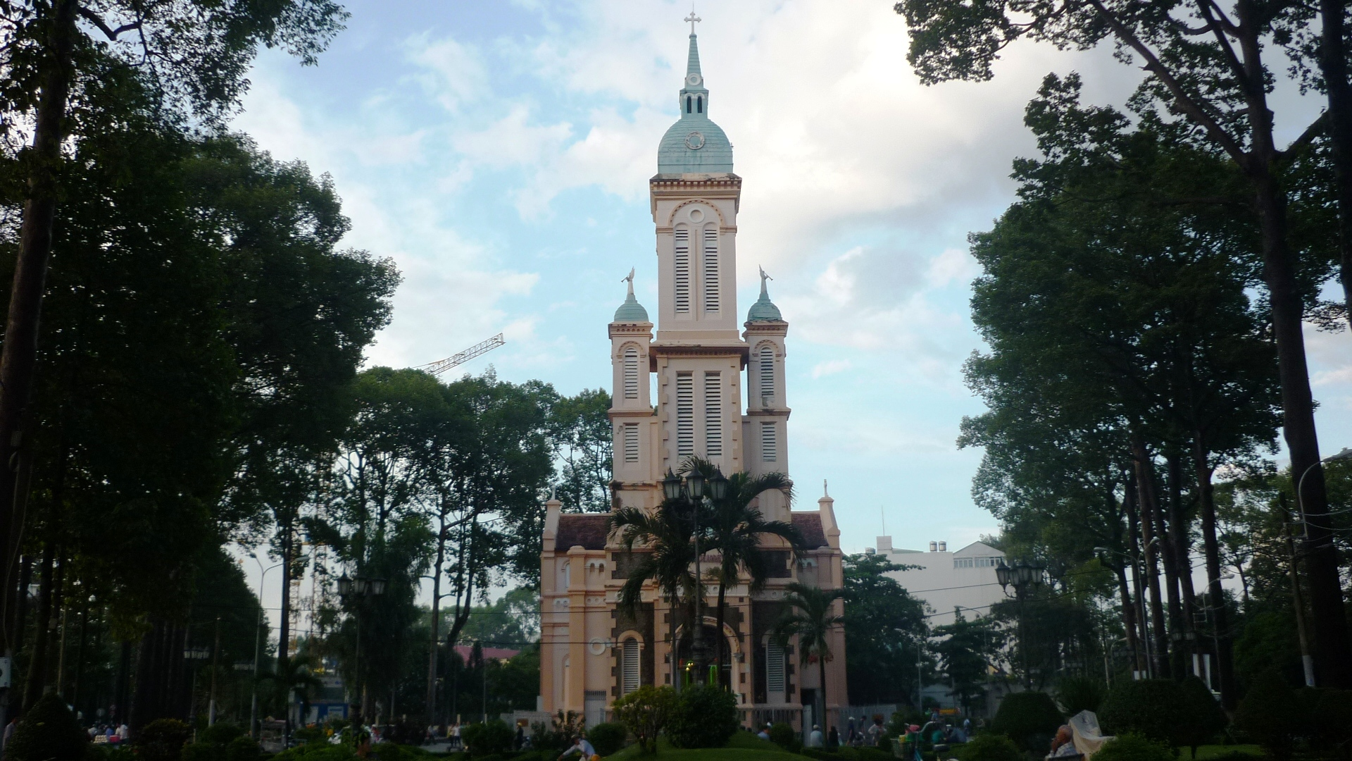 Nhà thờ Thánh Jeanne d'Arc tọa lạc số 116A đường Hùng Vương, phường 9, quận 5, thành phố Hồ Chí Minh